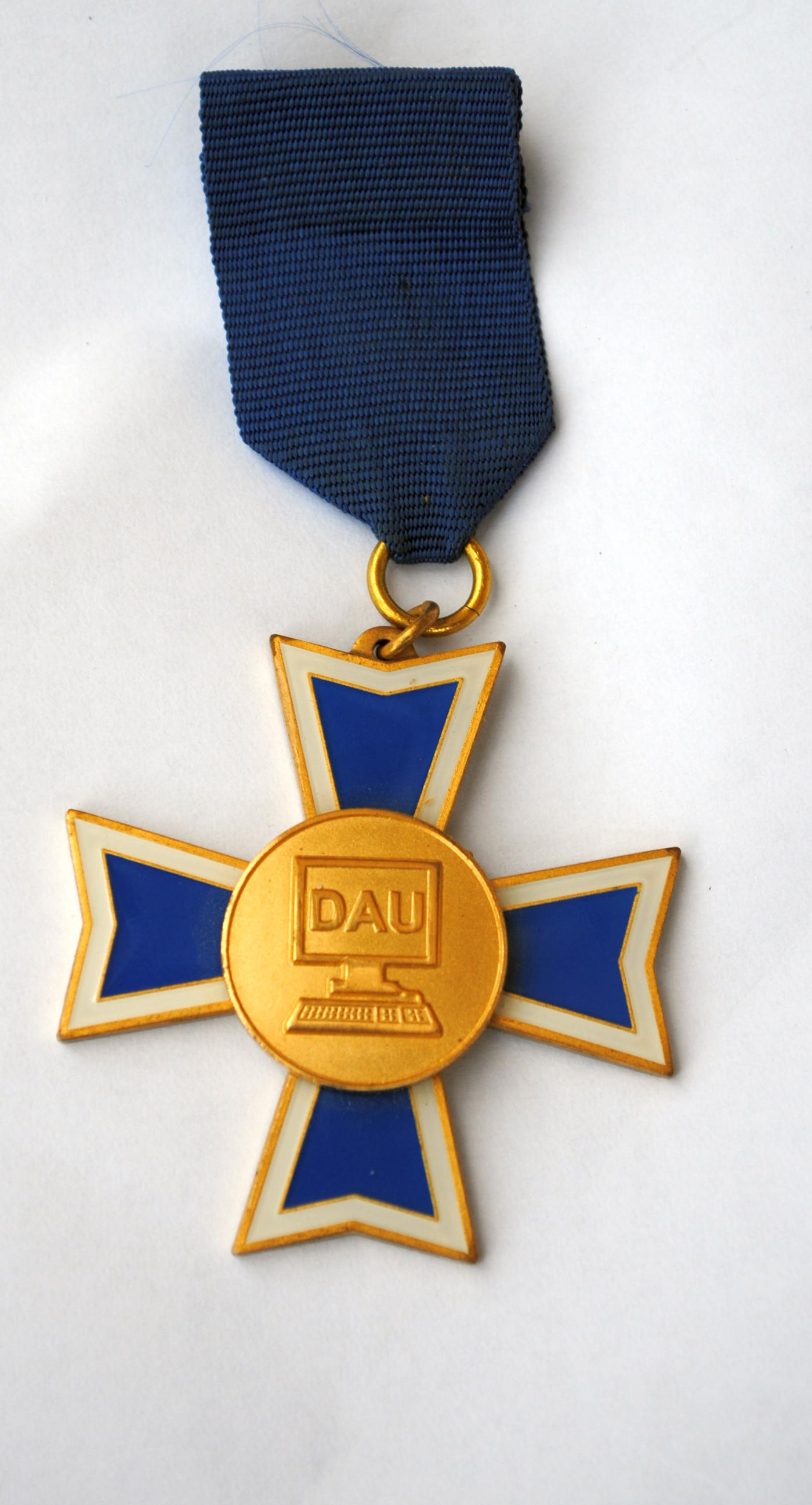 Auftragswerk für den DAU (Präwema Markneukirchen)